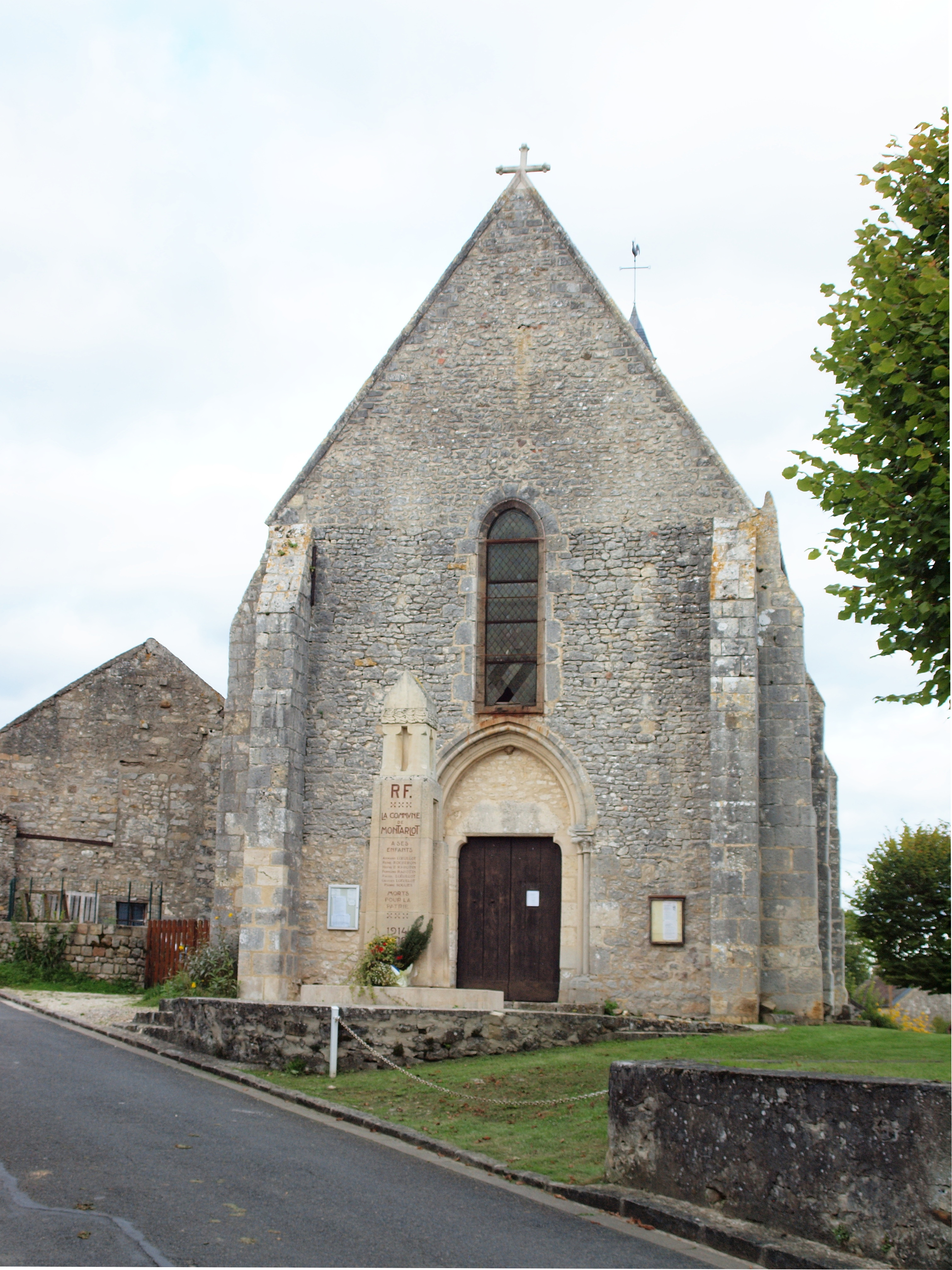 Église Saint-Mammès de Montarlot (Seine-et-Marne, France)